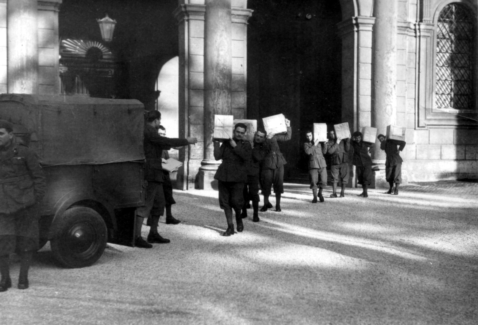 Giorgio Monteforti (1915-1967) and other comrades of his carrying books to be sent to the soldiers fighting at the front. The books were taken away from the Library of Palazzo Barberini in Rome, on 1941.